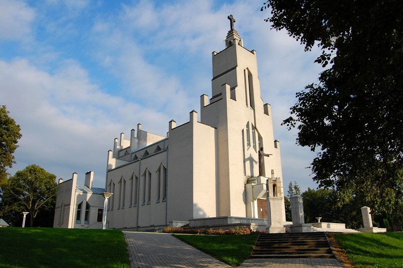 Truskavos Šventosios Dvasios bažnyčia